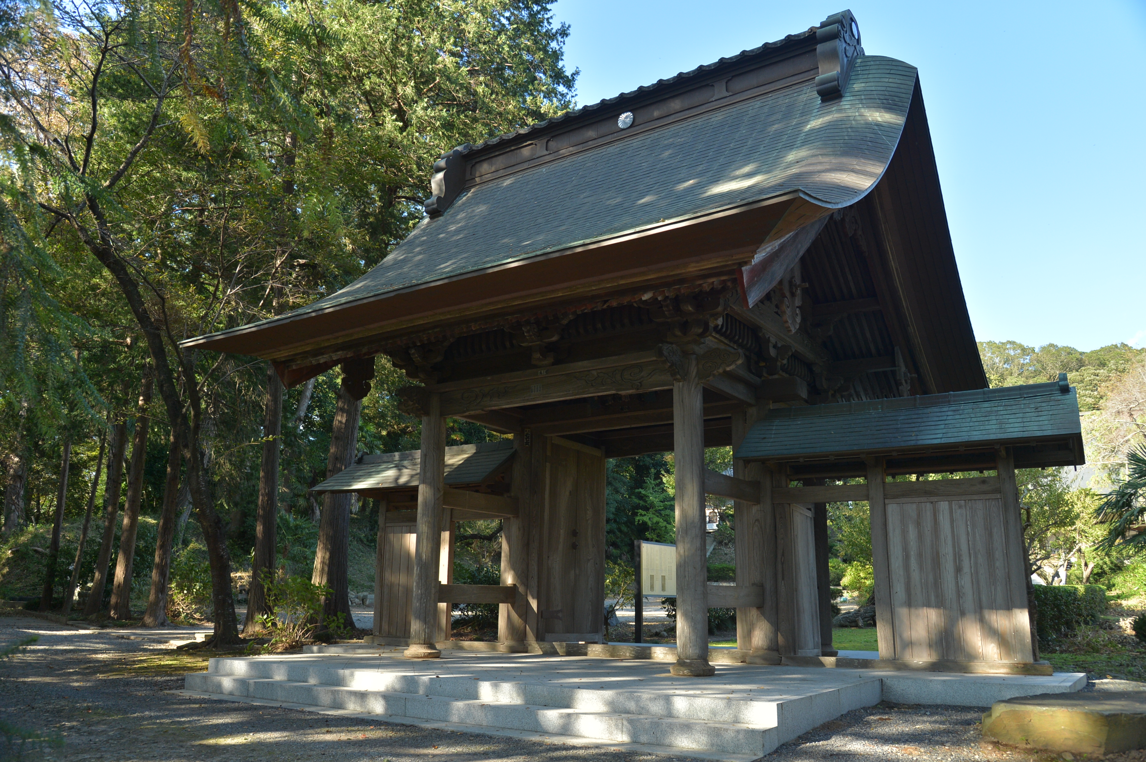 法雲寺の正門（茨城県土浦市高岡） Nikon Df